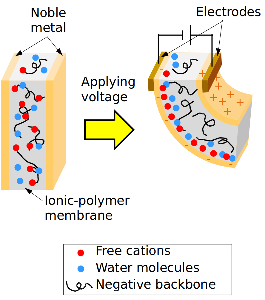 Taken from "Proposal of a novel method for oscillating IPMCs with DC input" by the author.